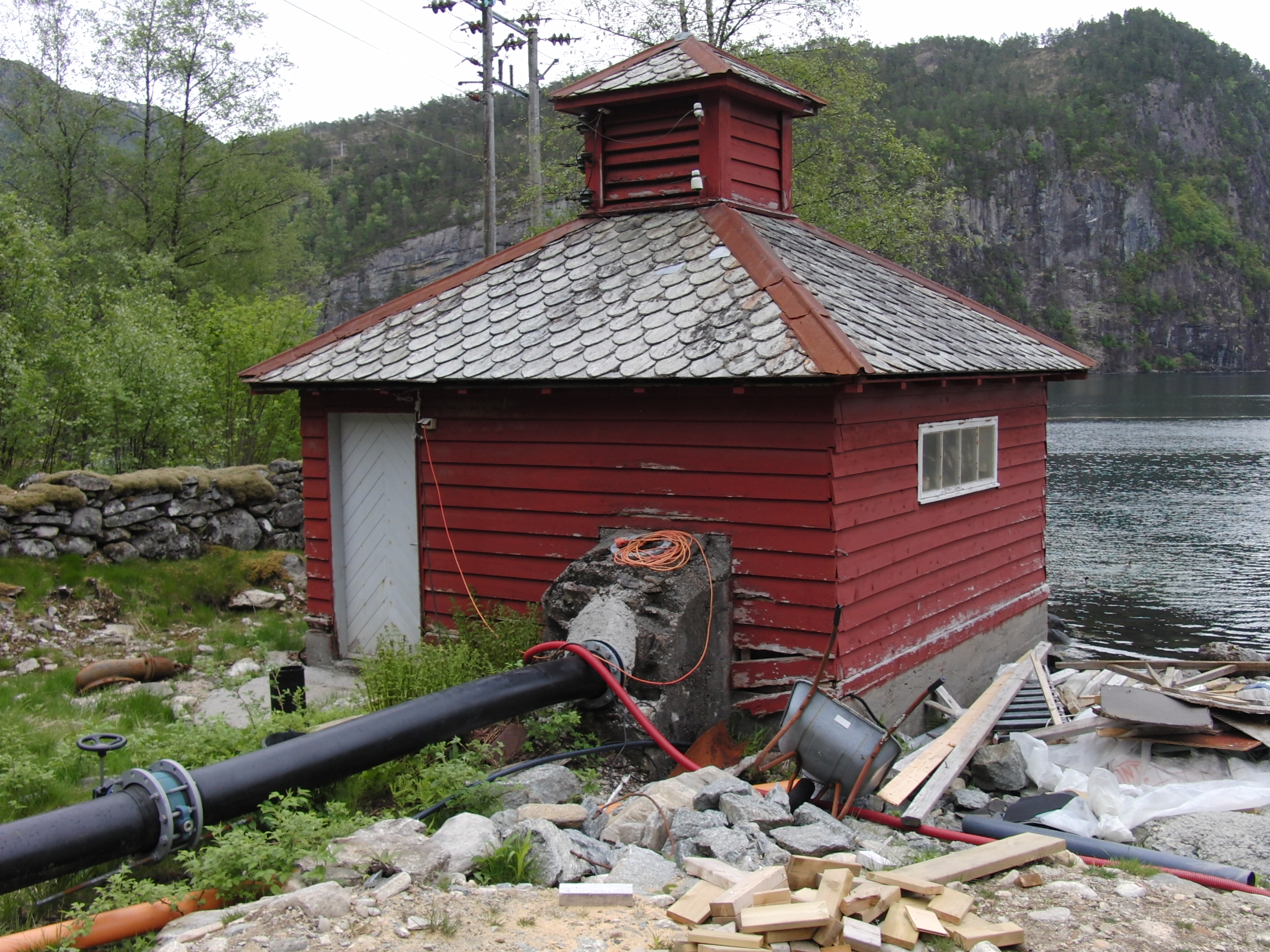 Nottveit gamle mikrokraftverk (nedlagt)